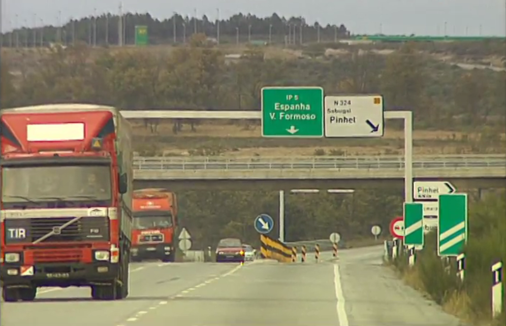 Antigo IP5 no nó do Alto de Leomil